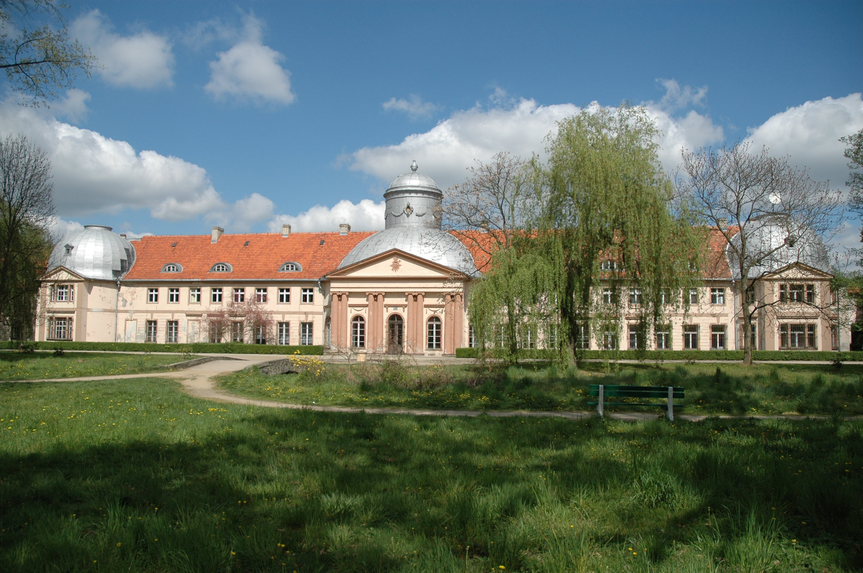 Poland, Milicz - classical palace